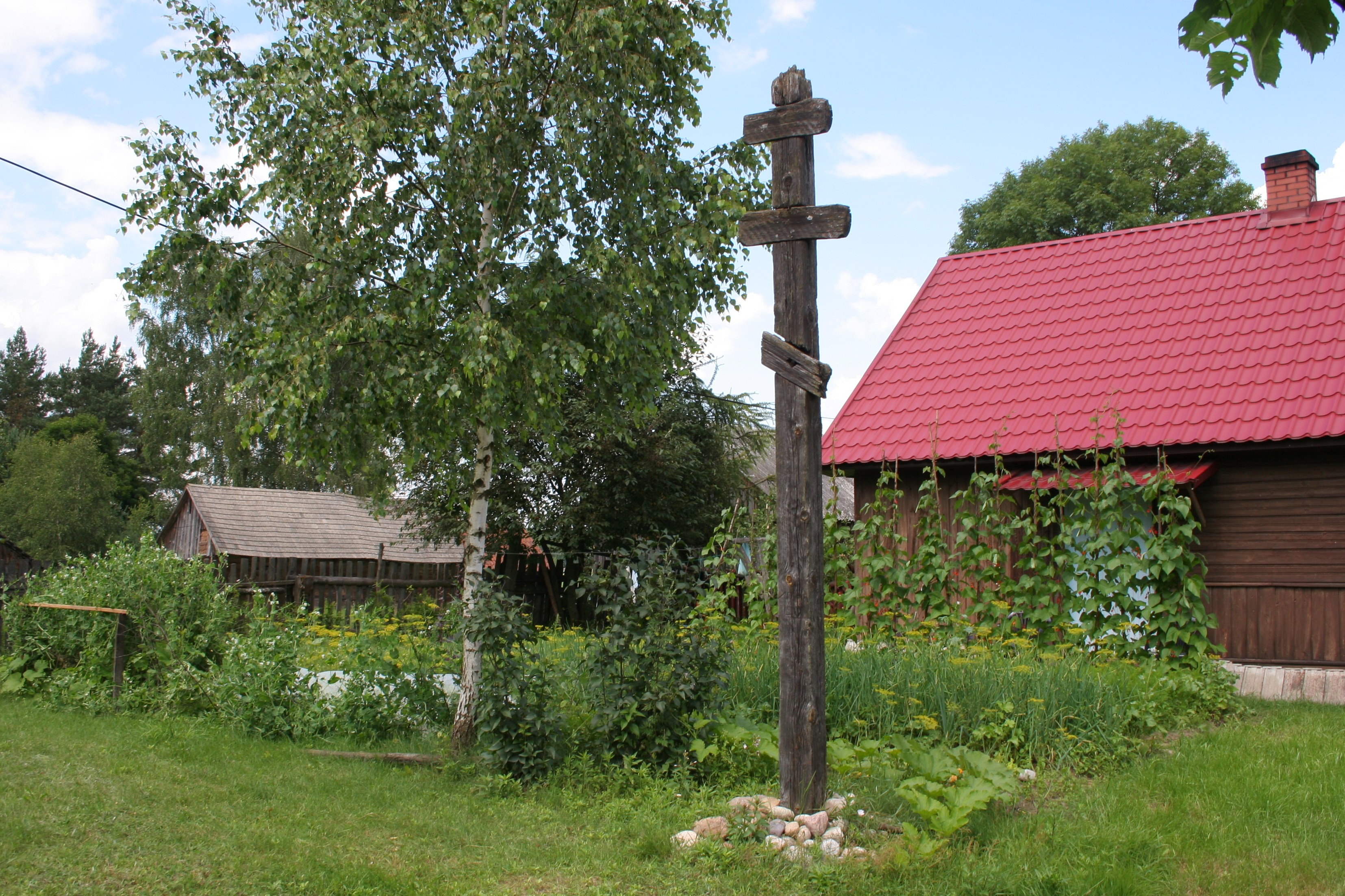 Krzyż i dom mieszkalny w Lewoszach.